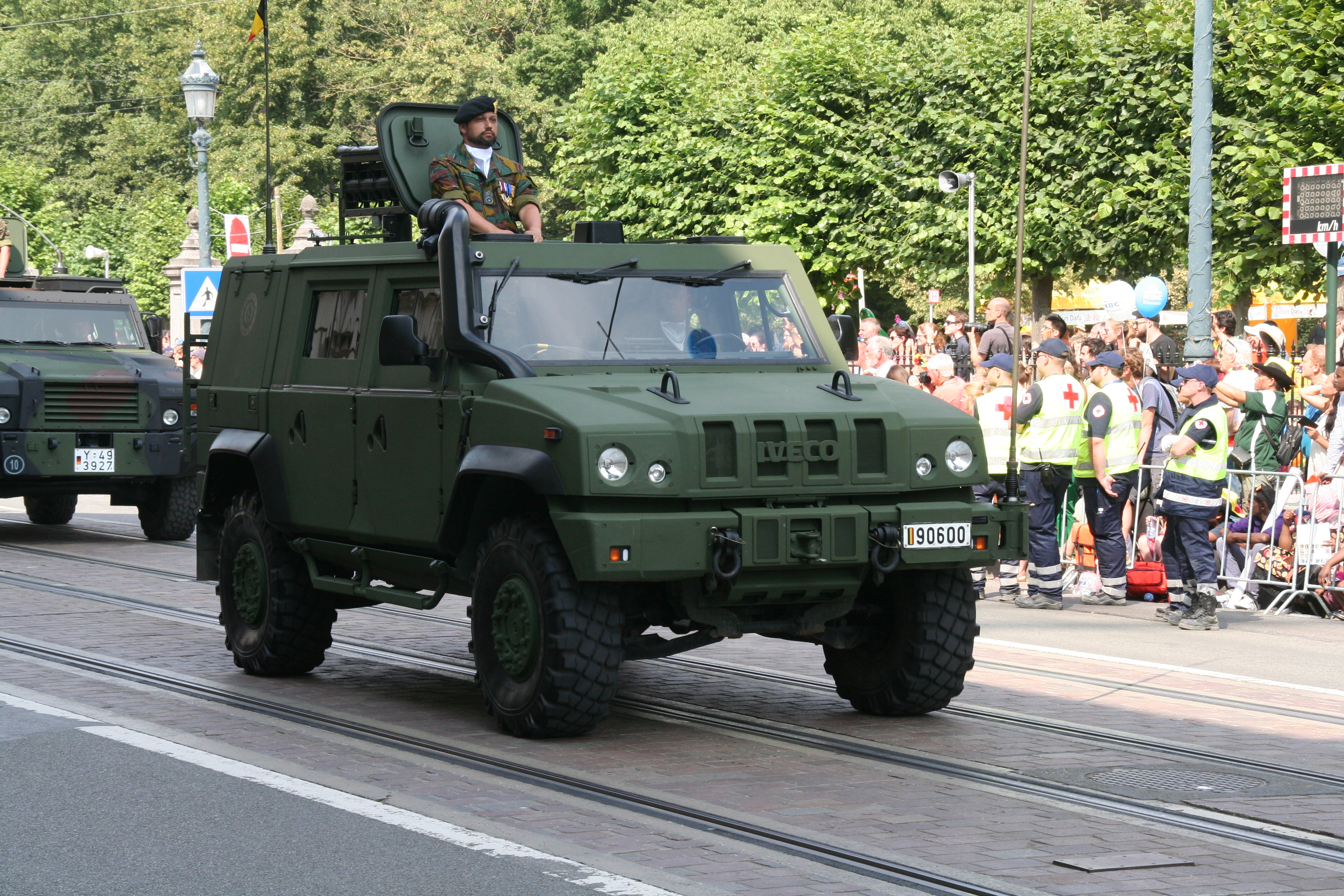 Fête nationale belge à Bruxelles le 21 juillet 2016 - Armée belge (Défense)